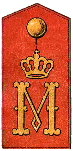 Schulterklappe des Kurhessischen Jäger-Bataillons-Nr. 11